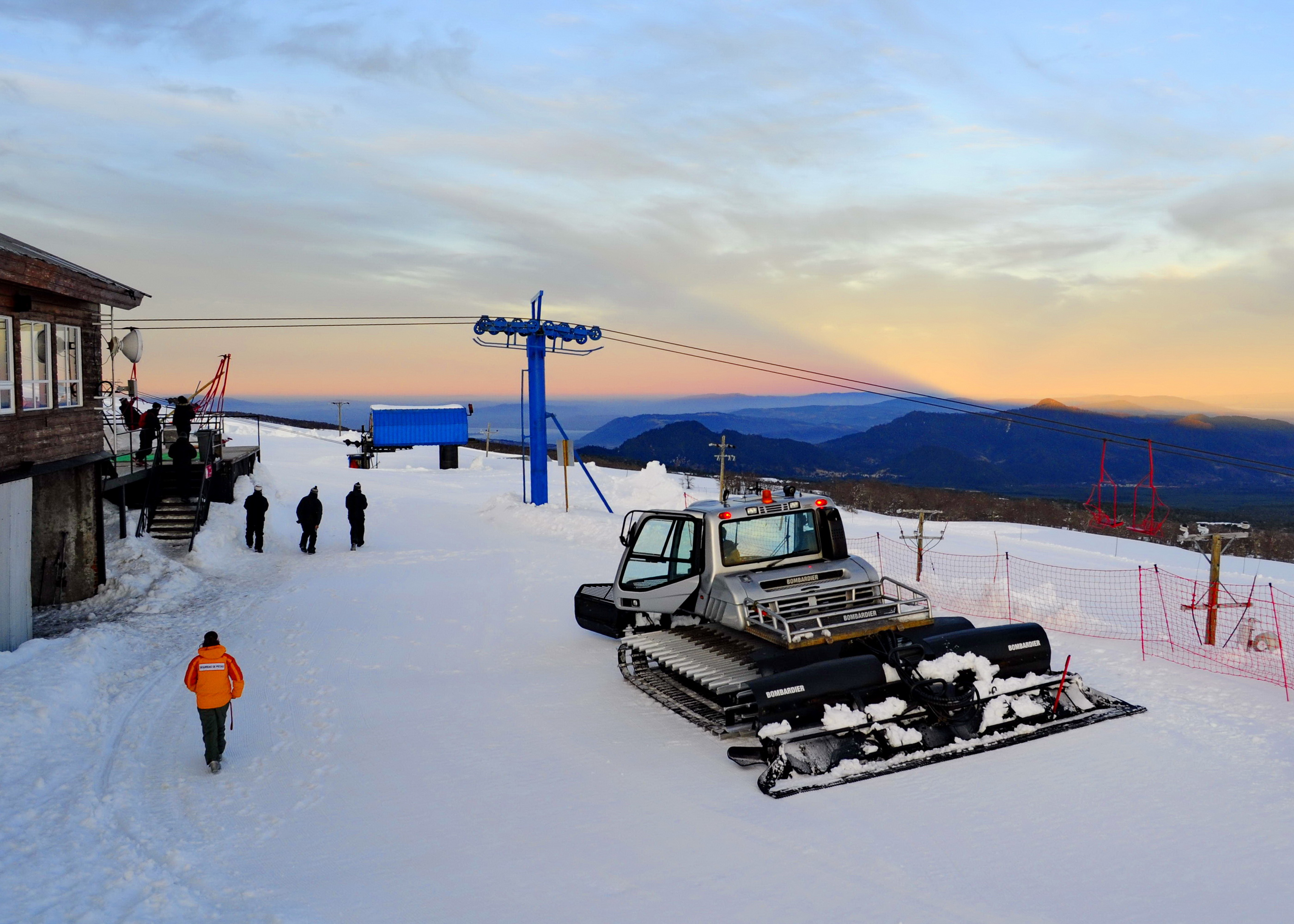 Telesilla en Volcán Villarrica